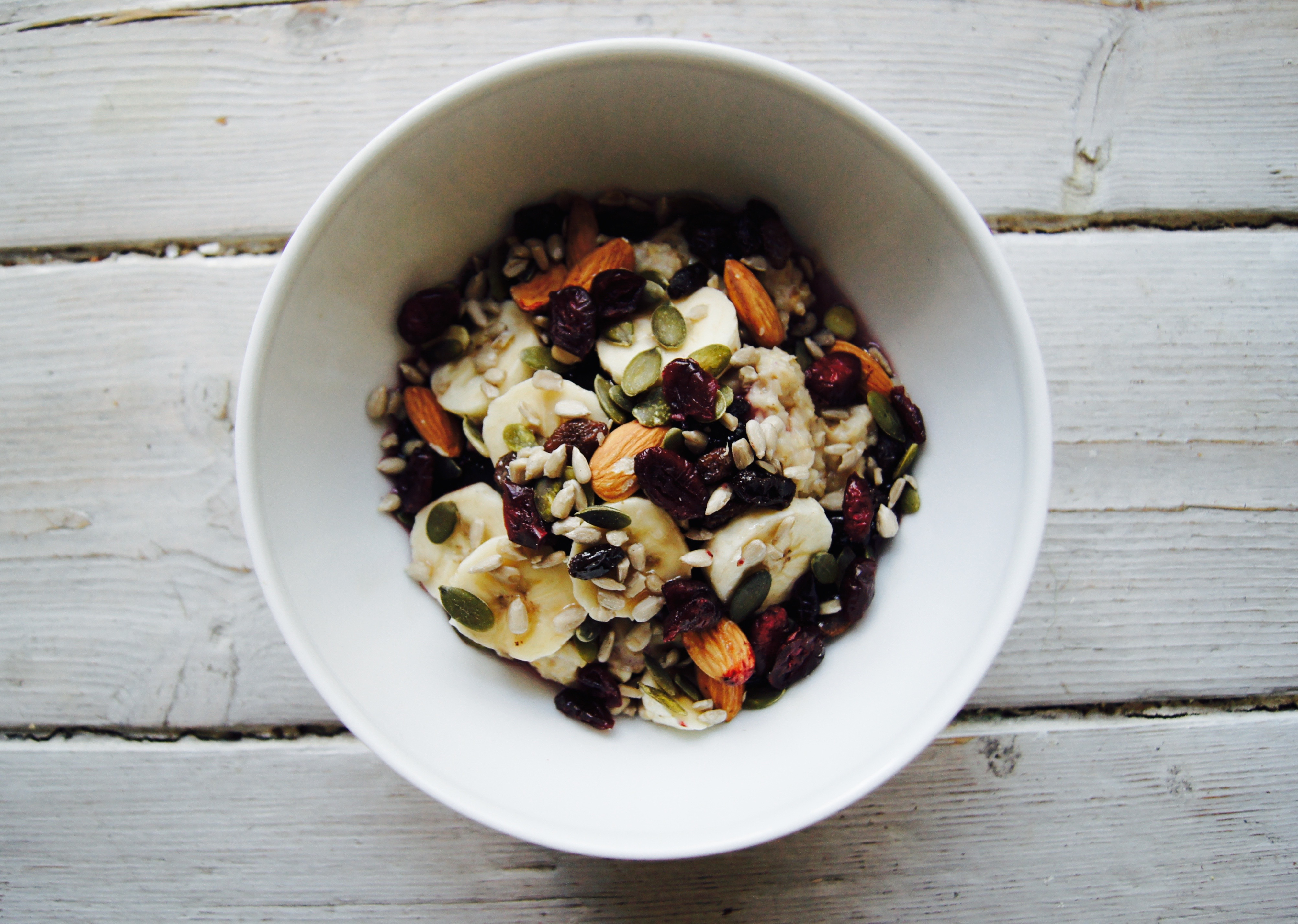 Havregrøt med banan, mandler,rosiner tranebær, solsikke- og gresskarkjerner.